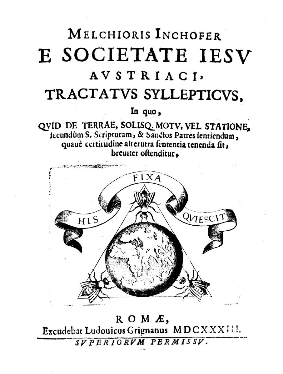 Frontespizio